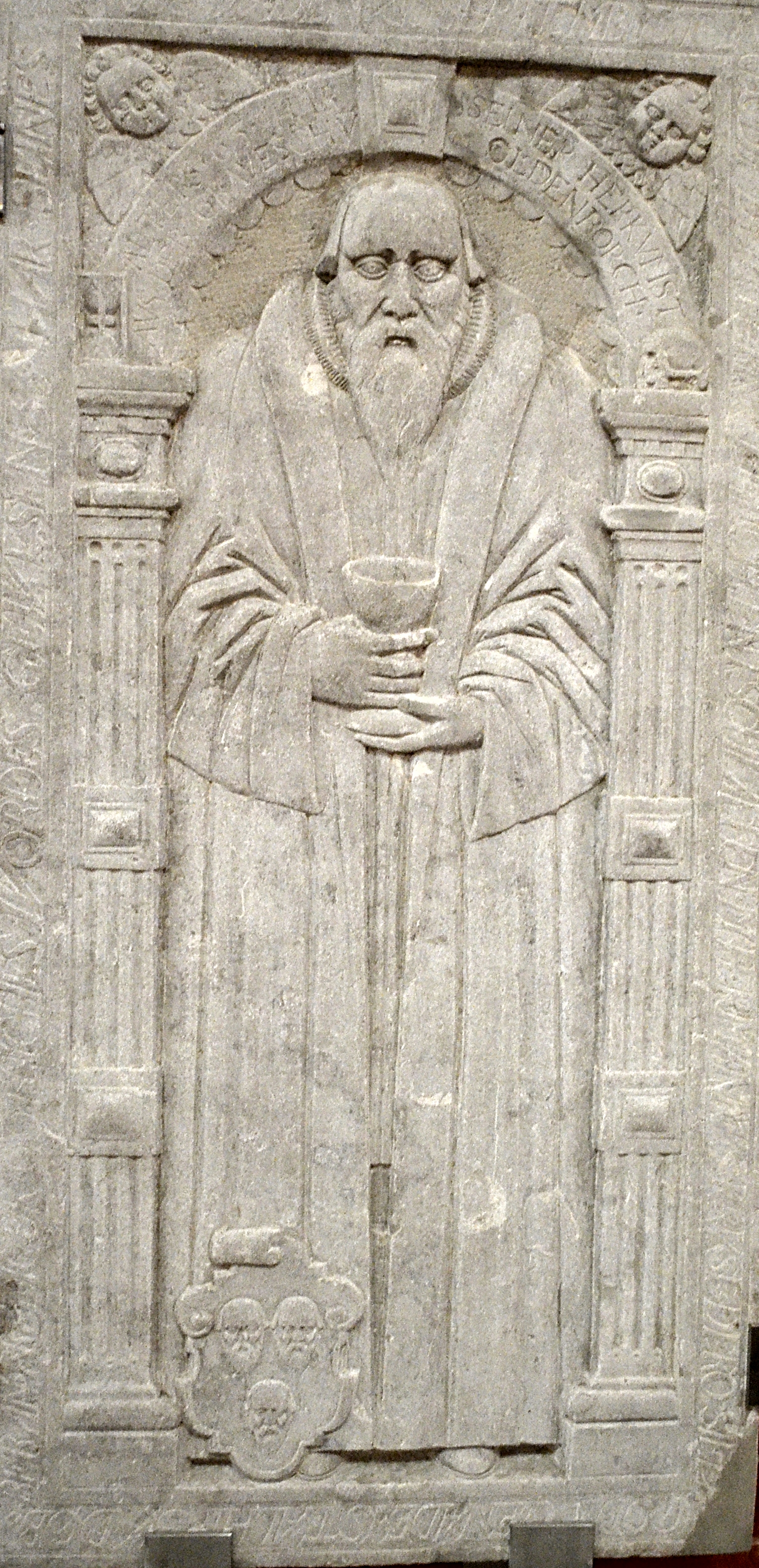 Bad Doberan, Münster, Grabplatte der Reaissance des lutherischen Pfarrers Magister Hermann Kruse (+ 1599) mit Halskrause; GND=119648261; er studierte an der Universität Rostock und war ab 1568 am Doberaner Münster tätig.